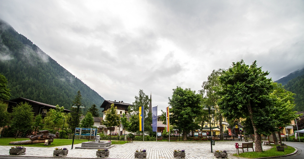 Mallnitz, der Dorfplatz